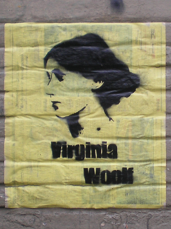 En la calle Augusta, en el mismo muro que George Sand, São Paulo, Brasil.